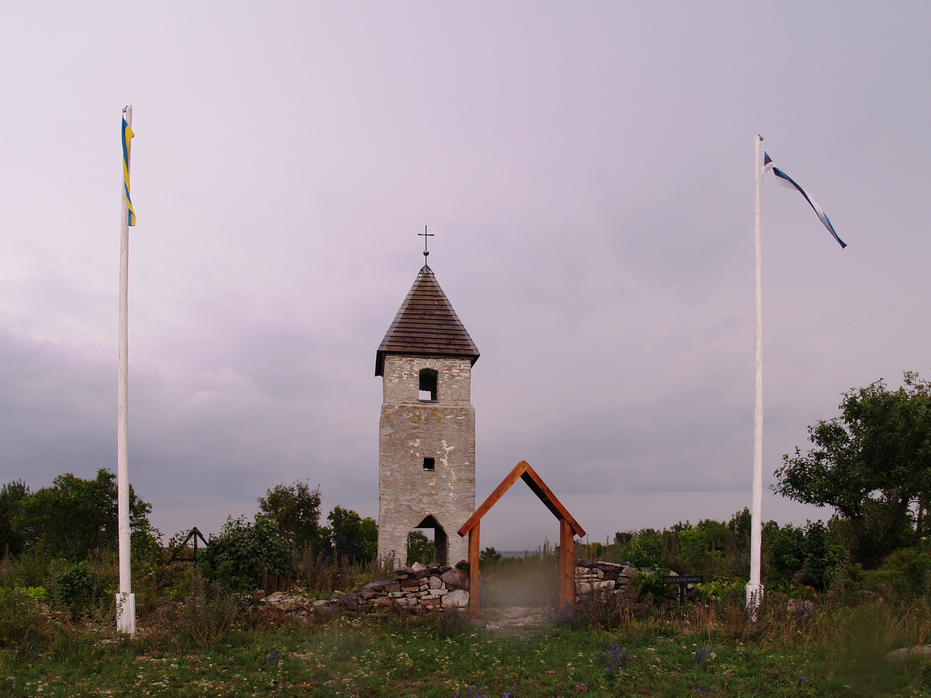 Väike-Pakri kabelitorn